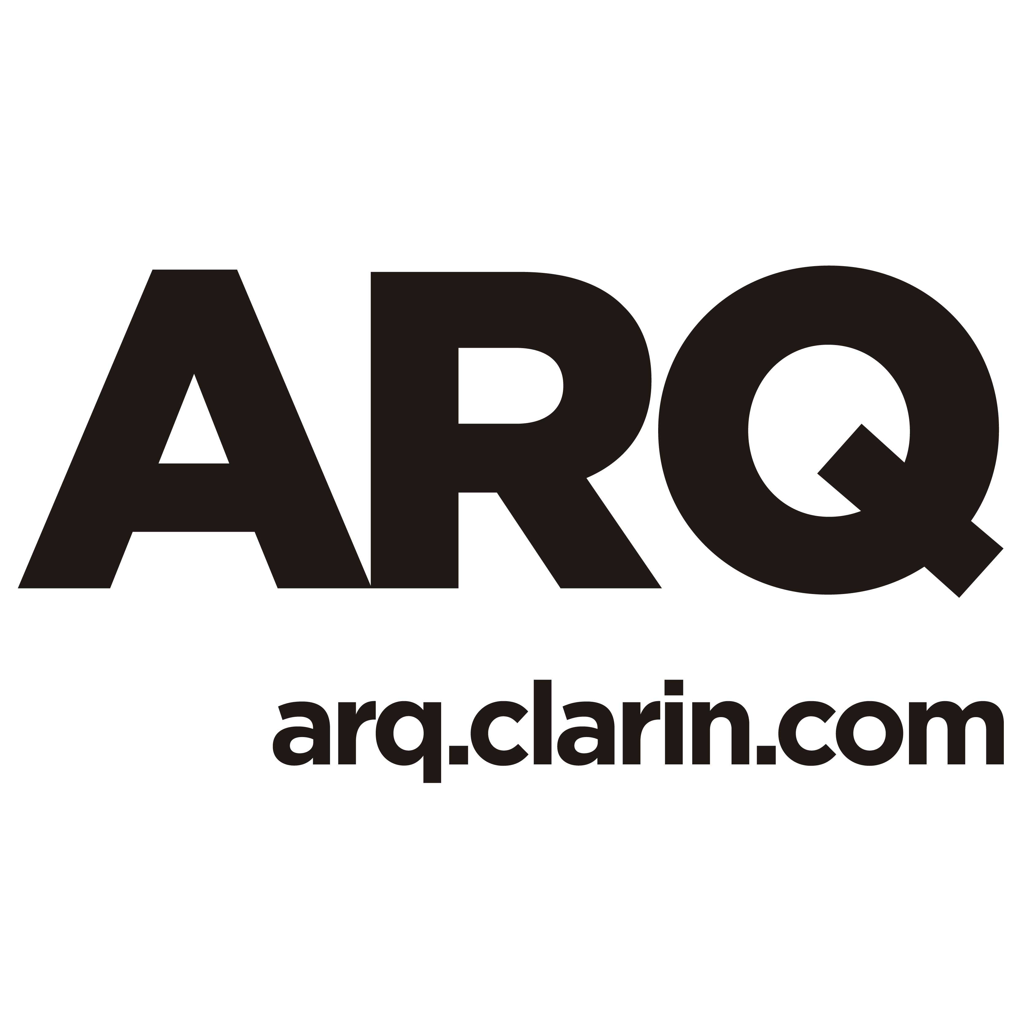 Logo ARQ/Clarin